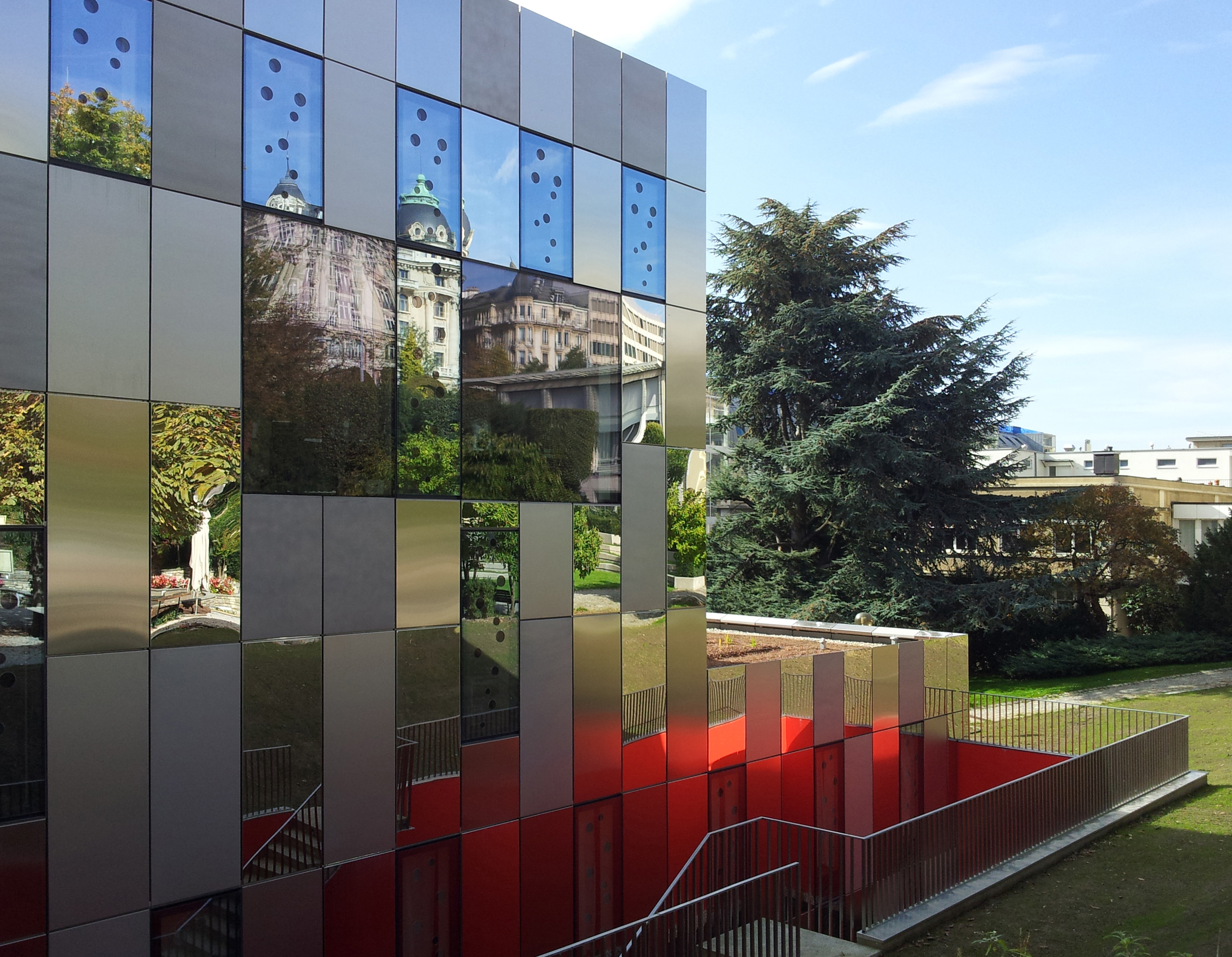 Opéra de Lausanne